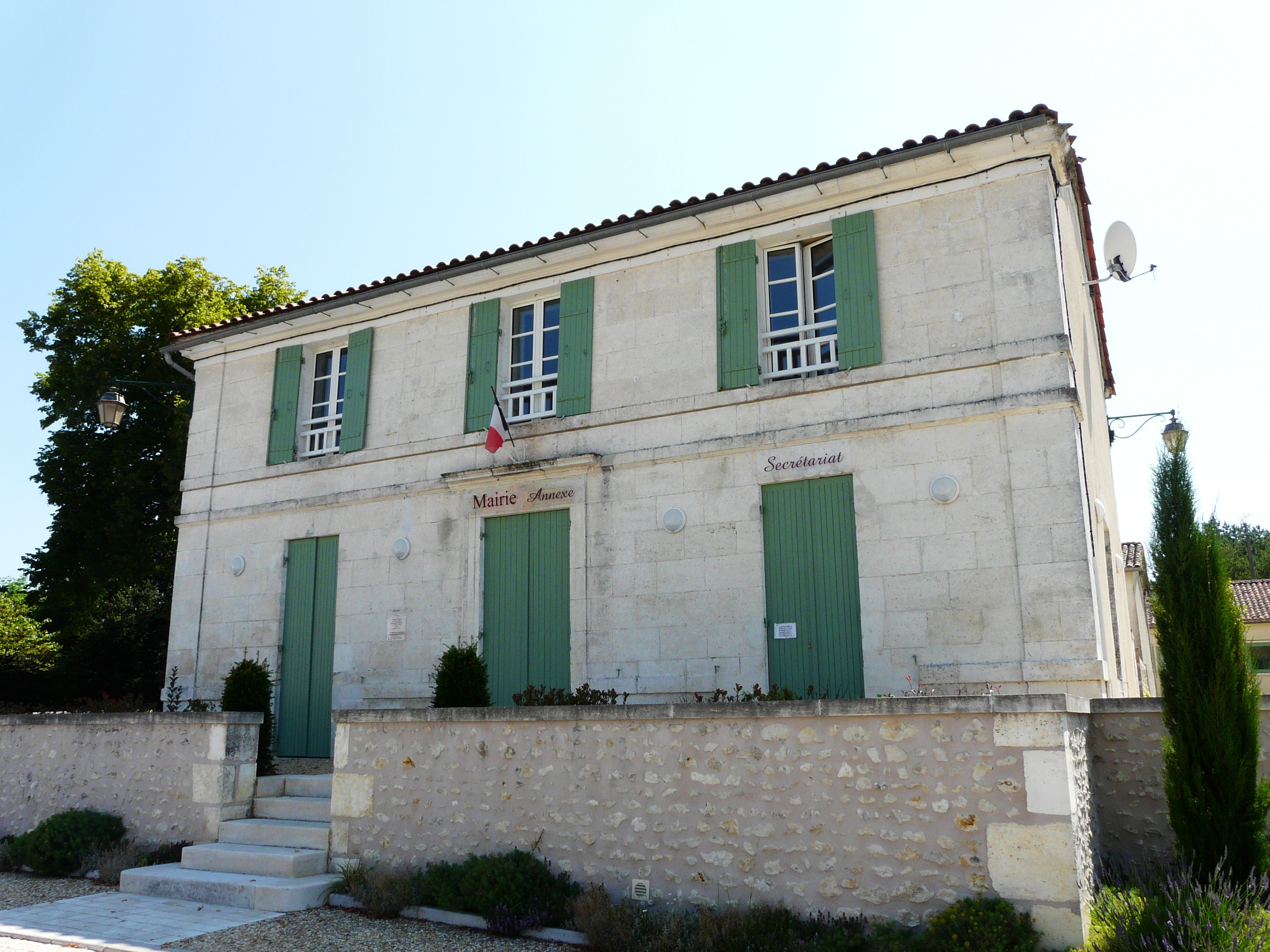 La mairie de Saint-Pardoux-de-Drône, Dordogne, France.